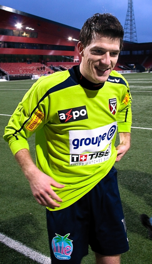 Le gardien de but et capitaine de Neuchâtel Xamax, Guillaume Faivre, à la fin d'un match de championnat de super league opposant son équipe au FC Sion.